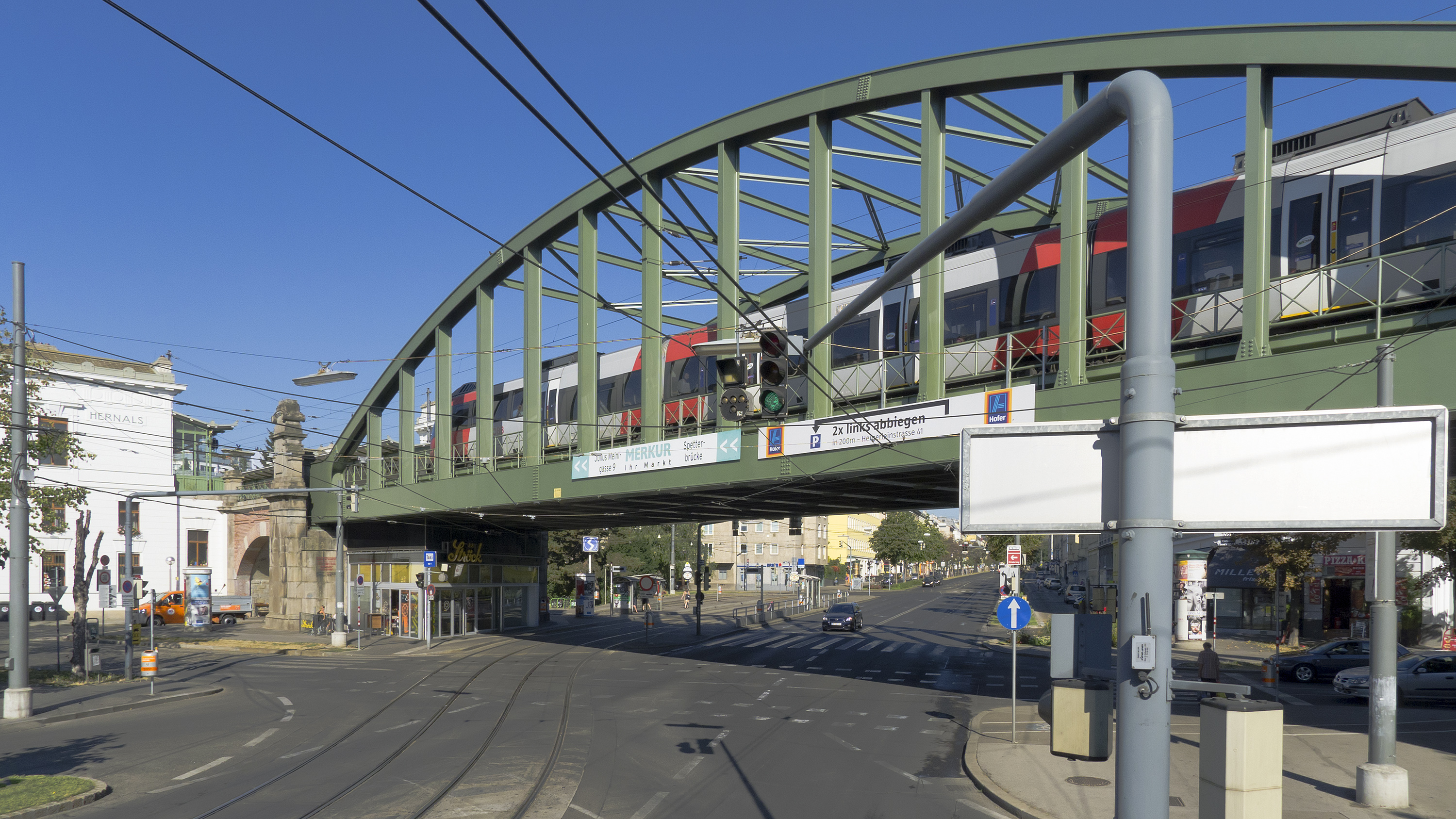 Hernalser Hauptstraße in Wien 17 bei der S45 Richtung Westen